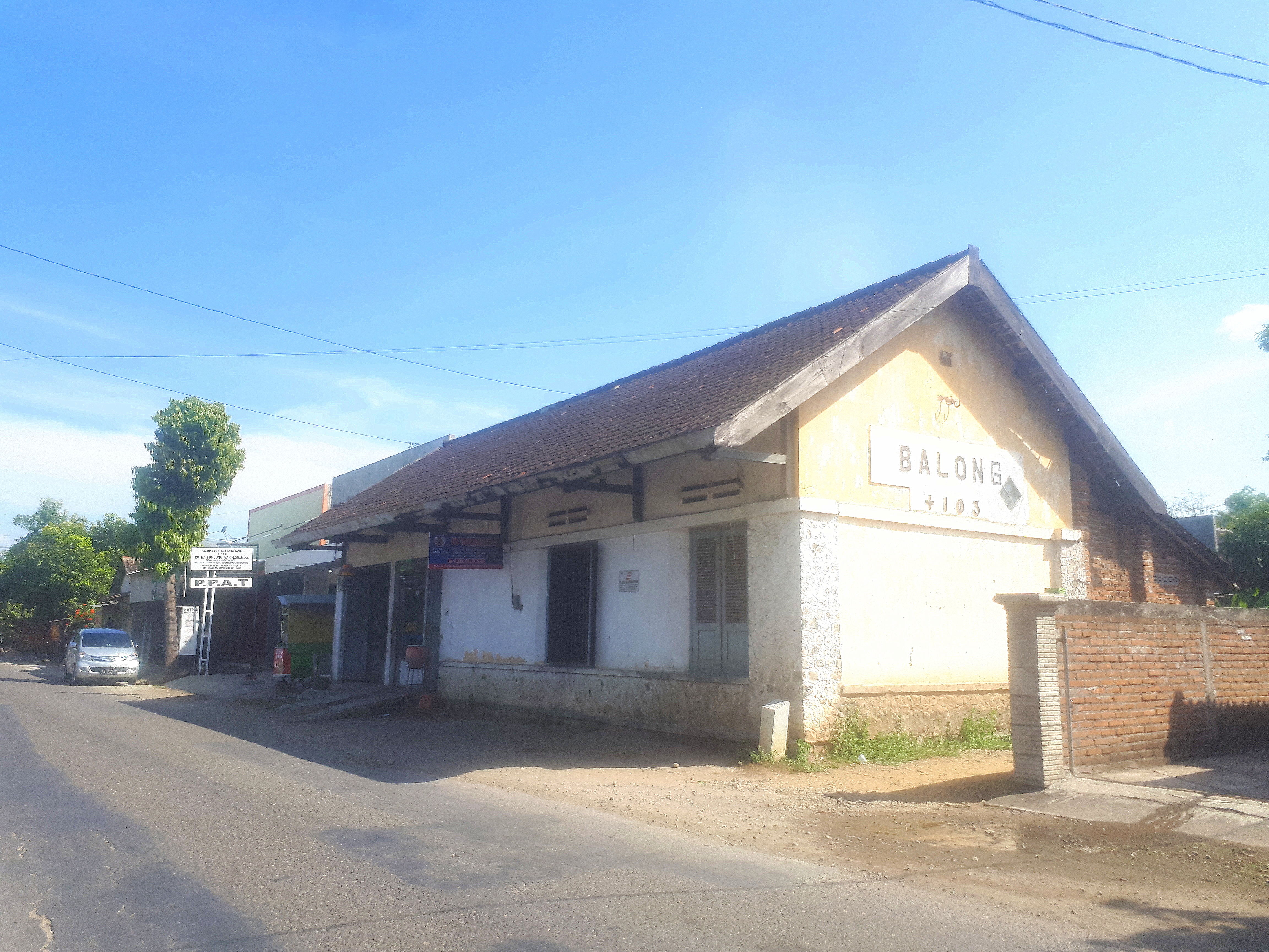 Tampak luar bangunan Stasiun Balong, salah satu stasiun nonaktif di Kabupaten Ponorogo